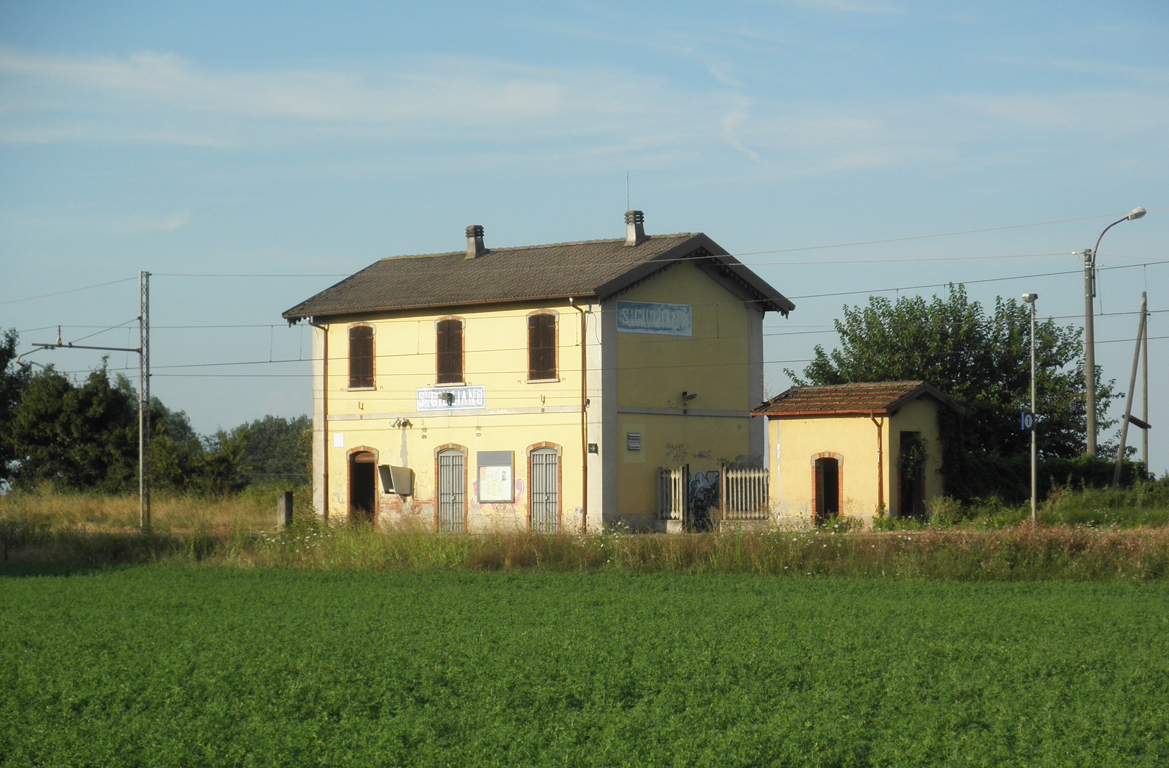 Fermata ferroviaria di San Giuliano Piacentino.